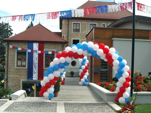 Mairie de Pont de Chéruy lors du 140 ième anniversaire